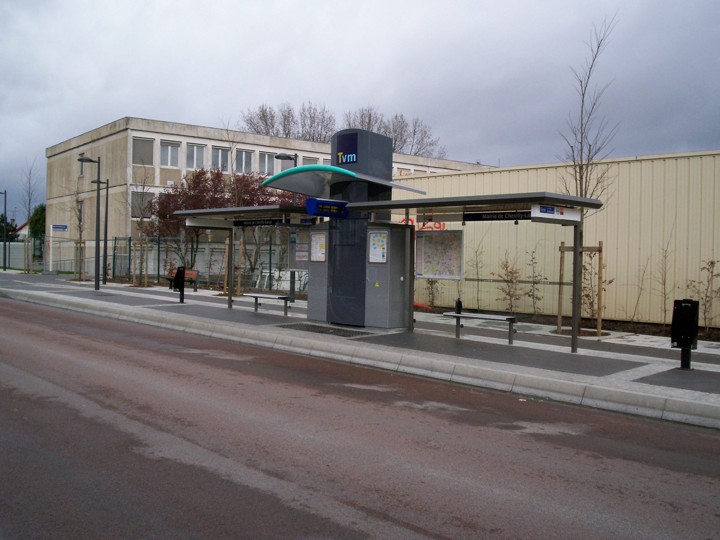 Abri voyageurs de la station "Mairie de Chevilly-Larue". Desservi par les bus en direction de La Croix de Berny